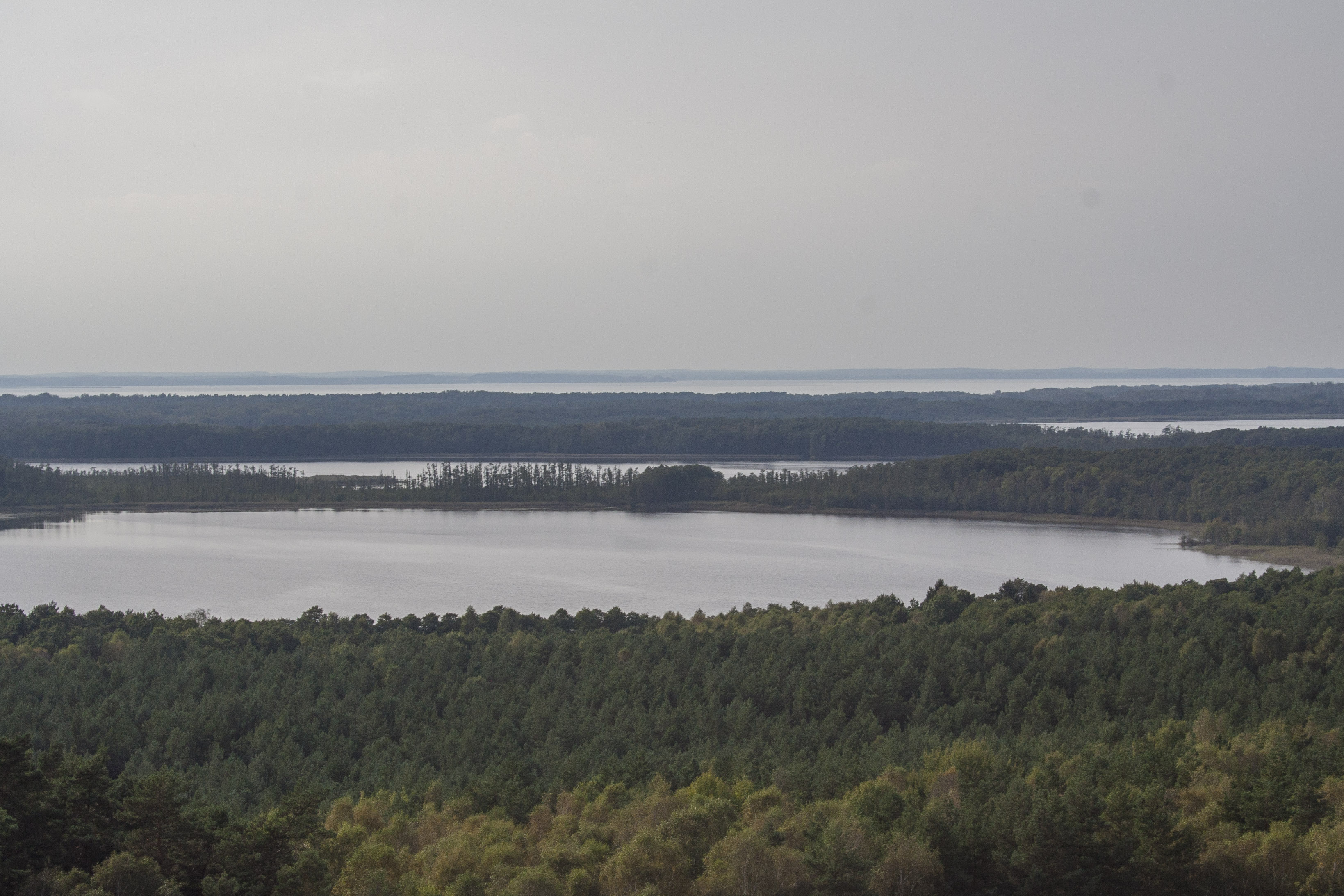 Müritz-Nationalpark